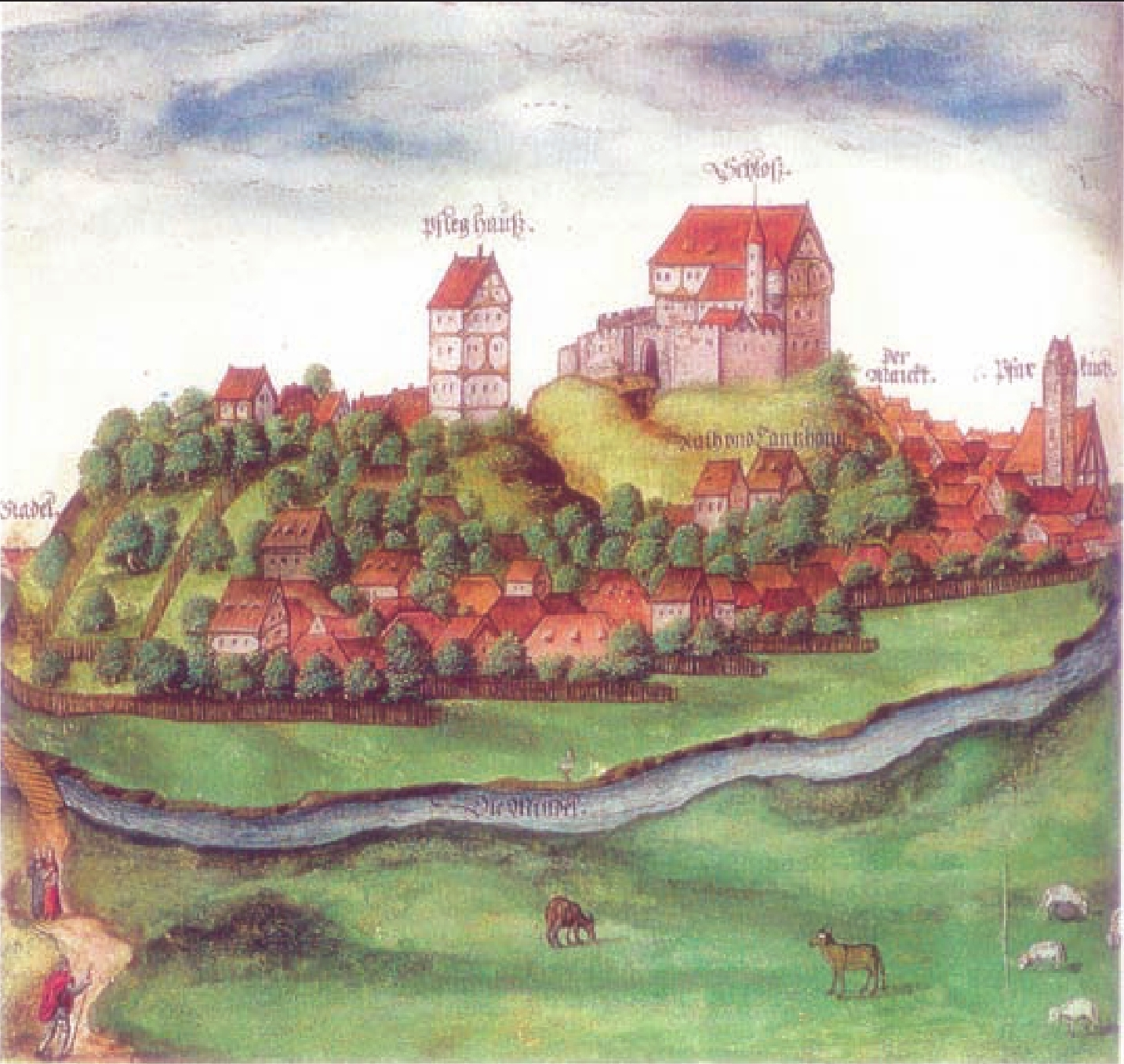 Burgau, Bayerische Staatsbibliothek Cgm 896, Bl. 138v